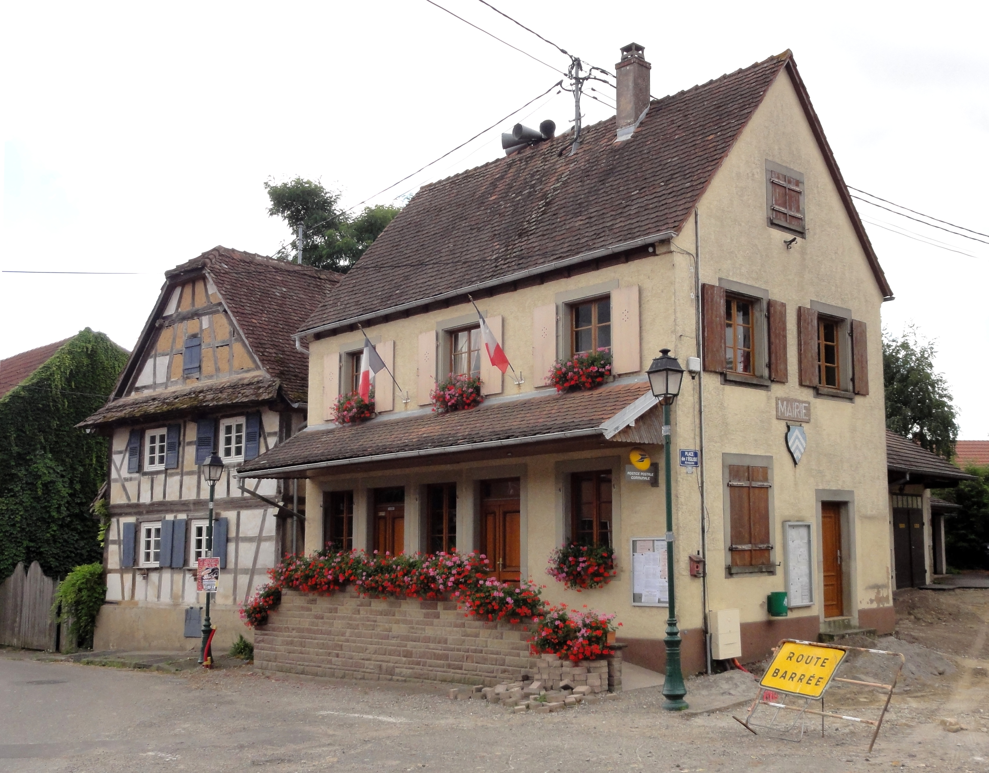 Alsace, Bas-Rhin, Duntzenheim, Mairie, 1 place de l'église.